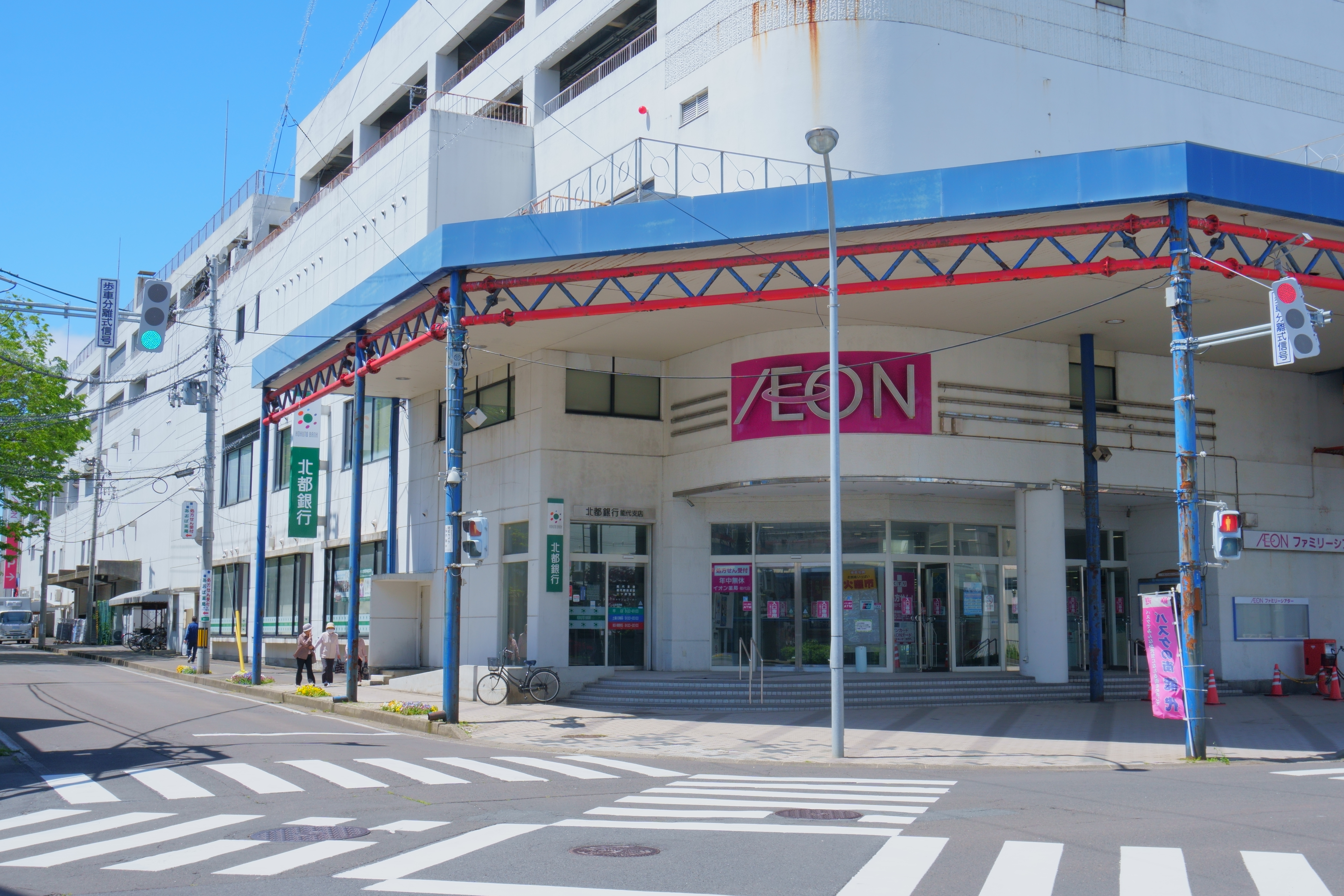 能代ショッピングセンター（イオン能代店）北東角にある北都銀行能代支店。この建物は北都銀行とイオンリテールが区分所有しており、いわゆるインストアブランチの形態には当たらない。また、2020年3月には二ツ井支店を、5月には能代駅前支店を「ブランチ・イン・ブランチ方式」として、従前の名目上の支店名や店舗番号を残したまま能代支店内に統合している。